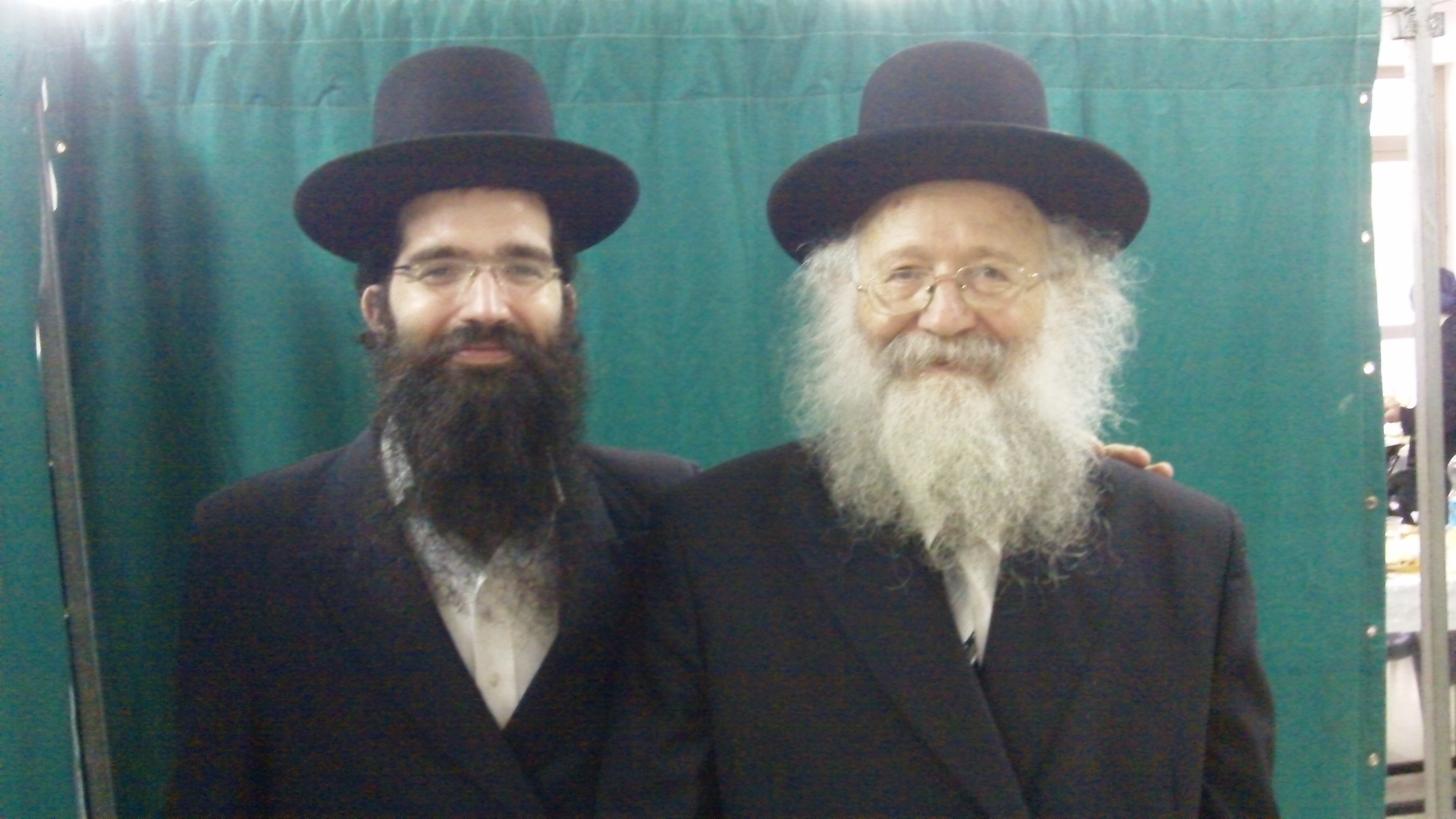 בברית מילה אצל נכדו אהרון סילמן